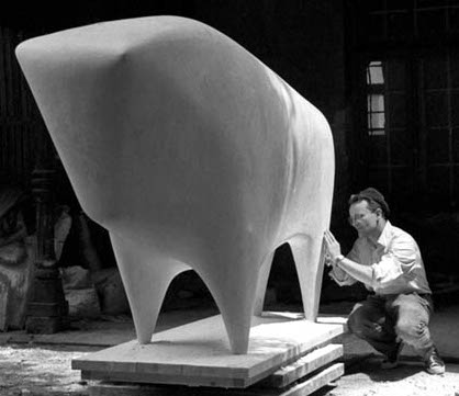 Srpskohrvatski / српскохрватски: Vojin Bakić radi na skulpturi Bika